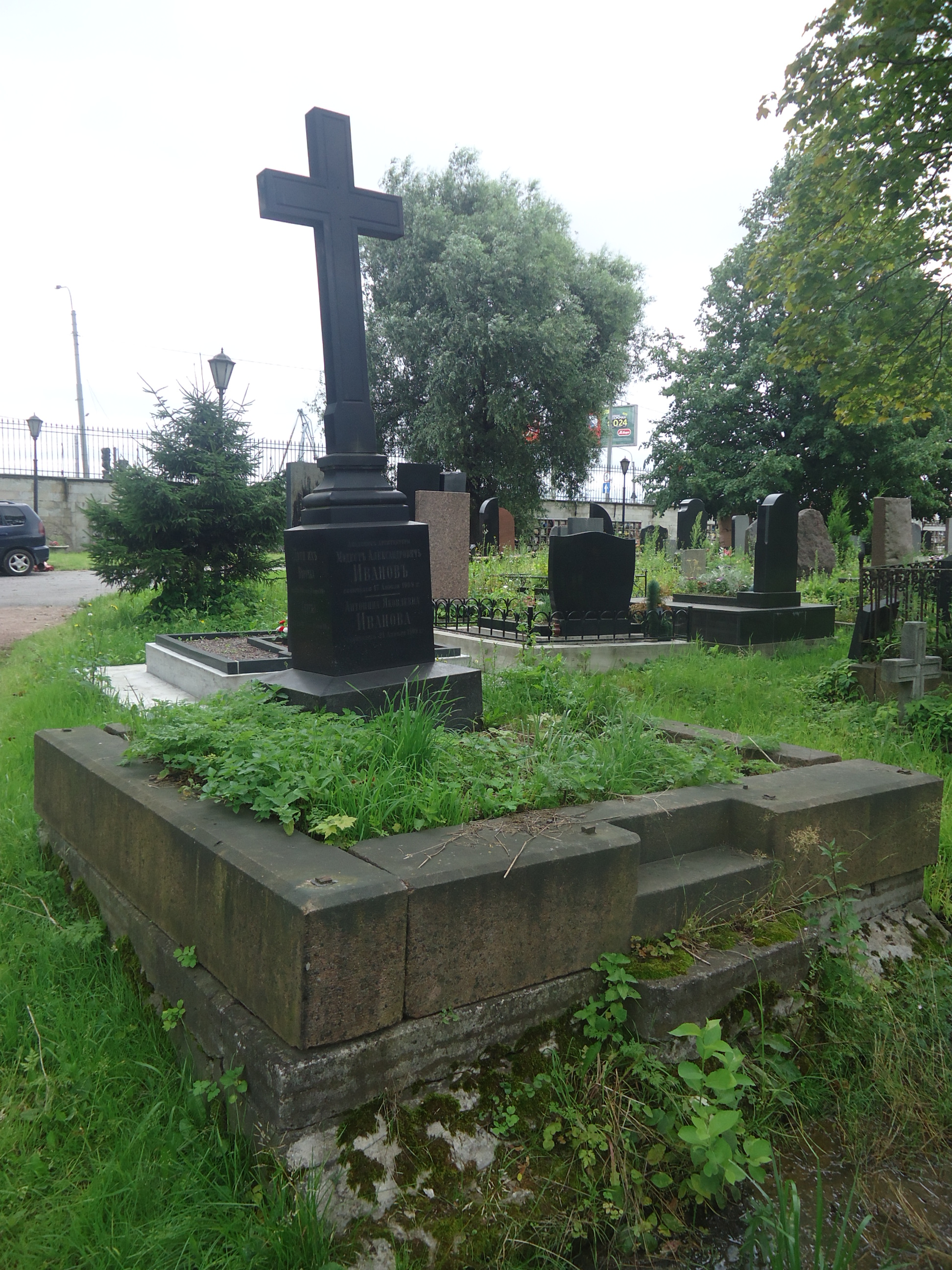 Никольское кладбище.